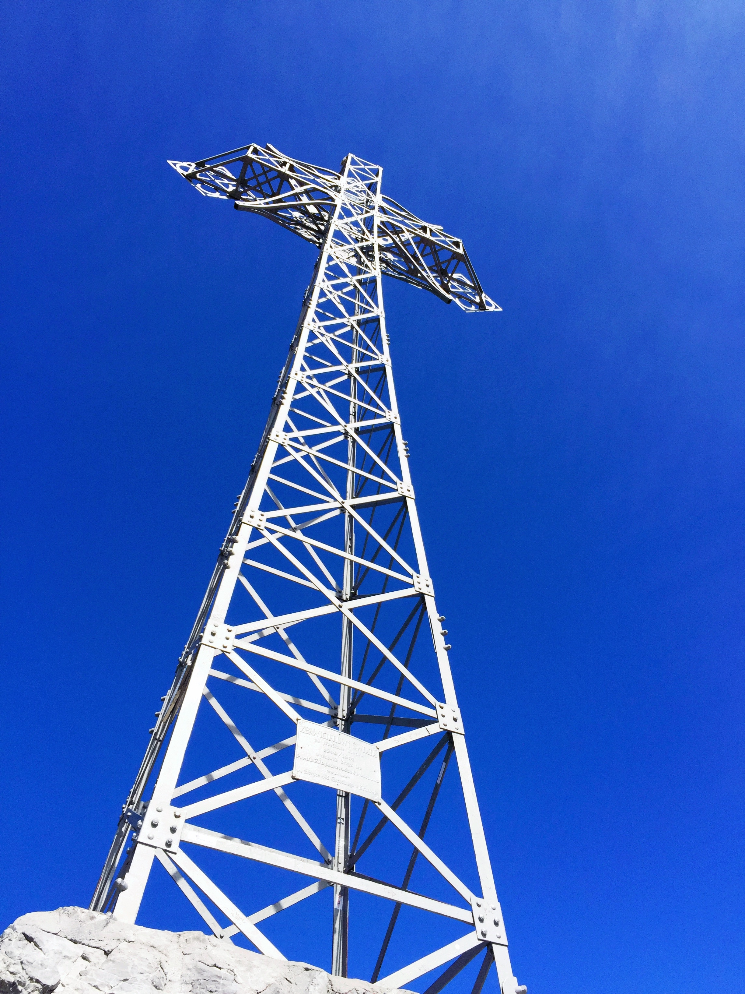 Park narodowy: Tatrzański Park Narodowy This is a photography of protected area with CRFOP ID PL.ZIPOP.1393.PN.14